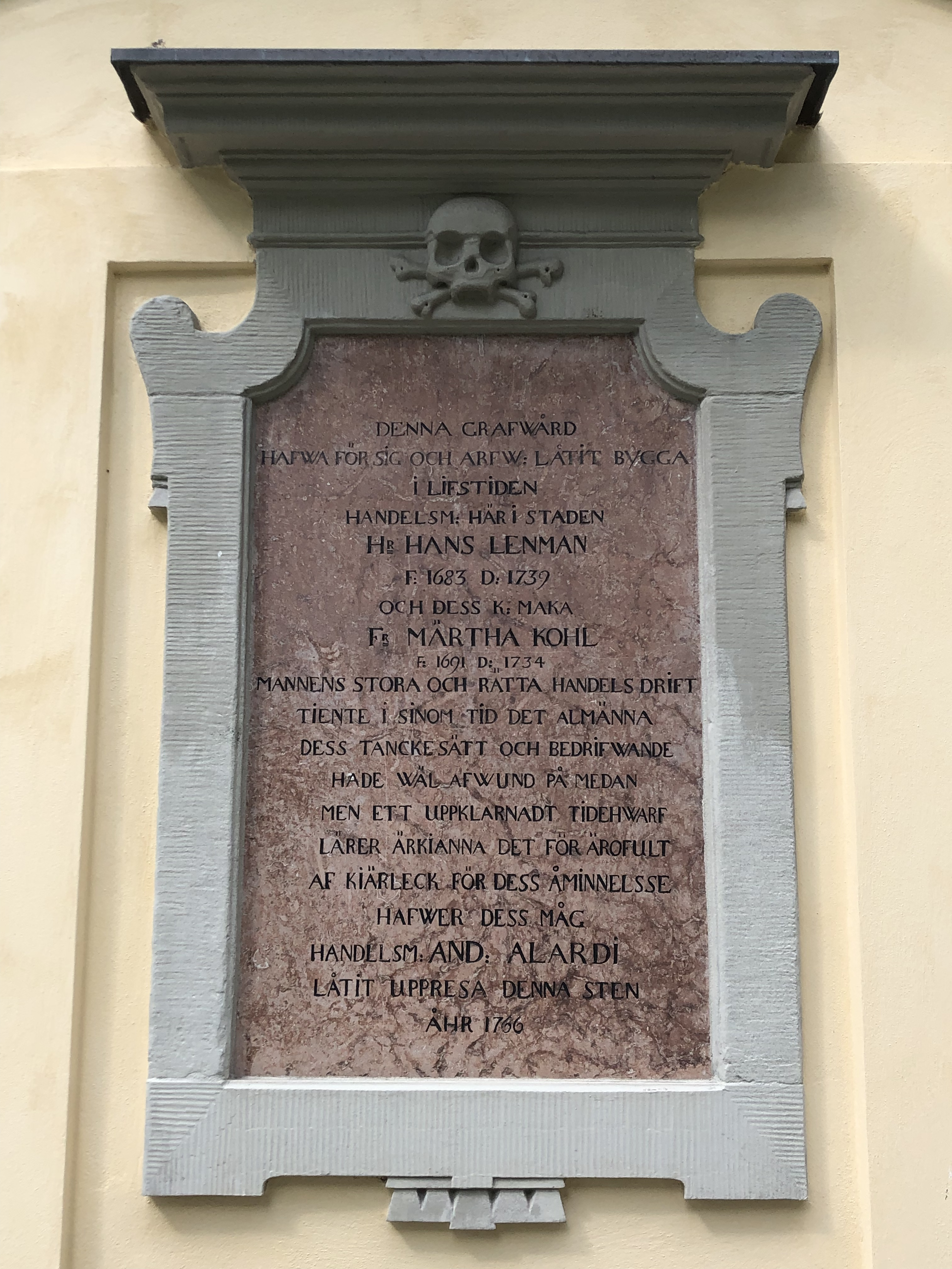 Handelsmannen i Stockholm Hans Lenmans gravvård på Kungsholmens kyrka i Stockholm.